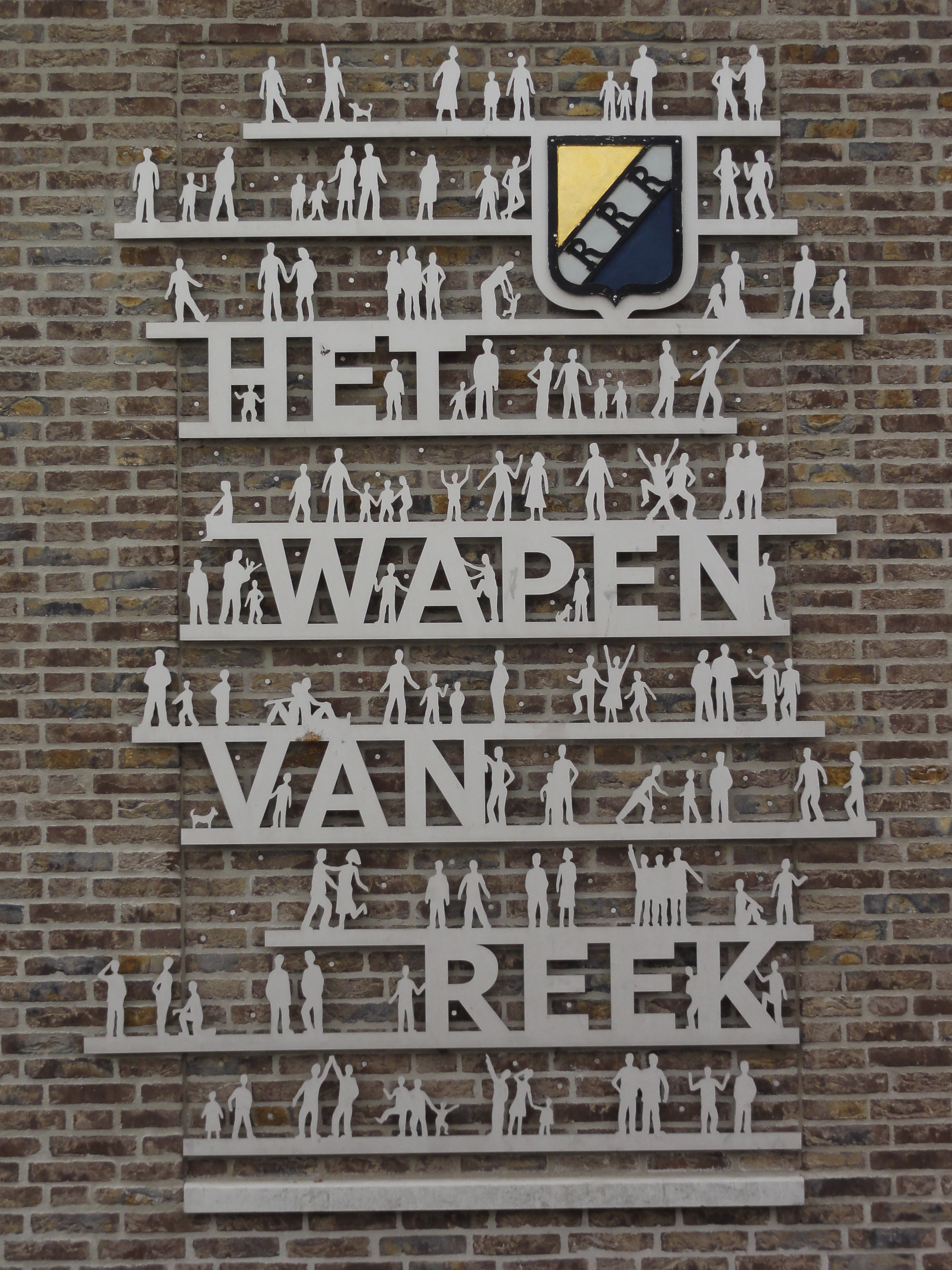 Reek (Landerd) muurdecoratie Het wapen van Reek.